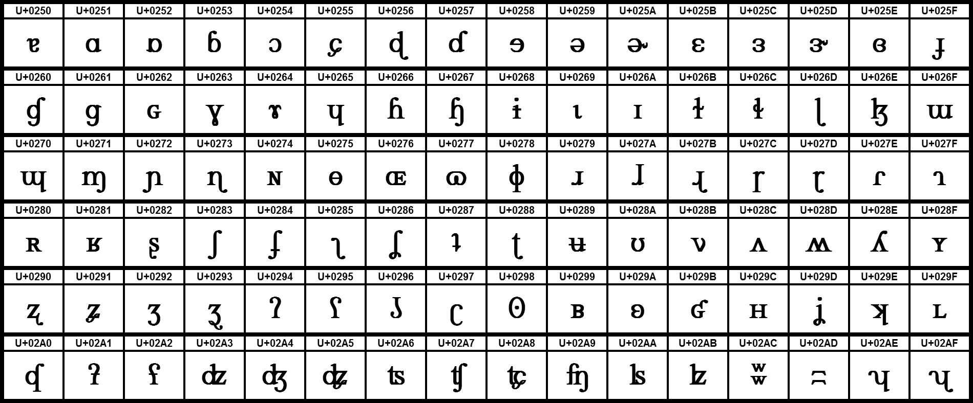 Grafiktafel für den Unicodeblock IPA-Erweiterungen.